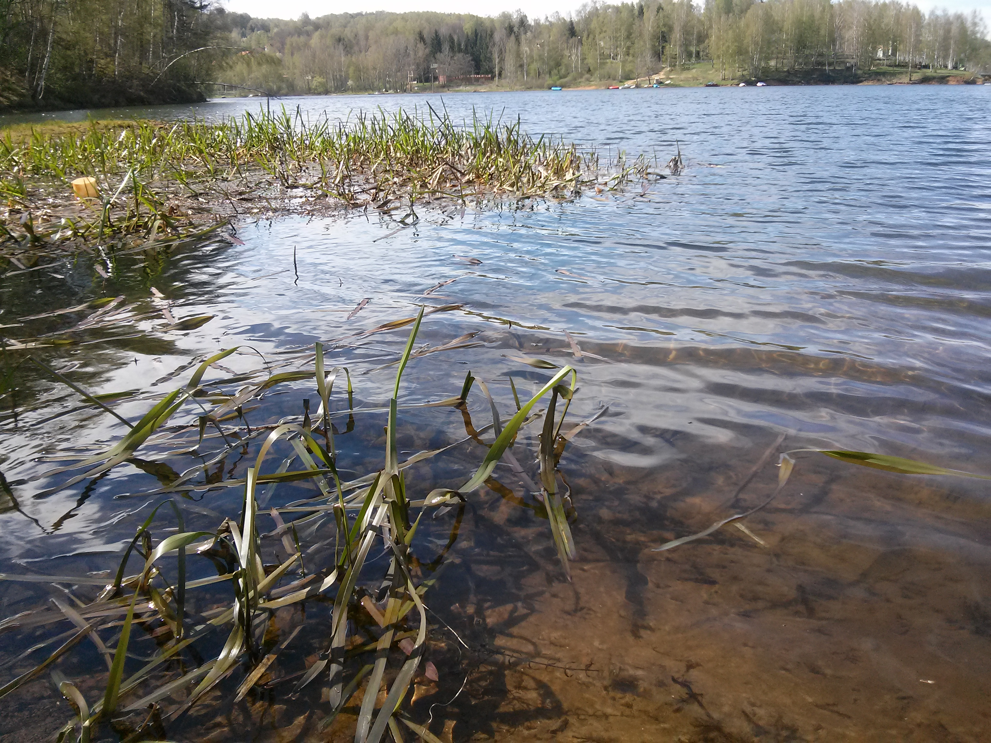 Srpski (latinica): Vlasinsko jezero